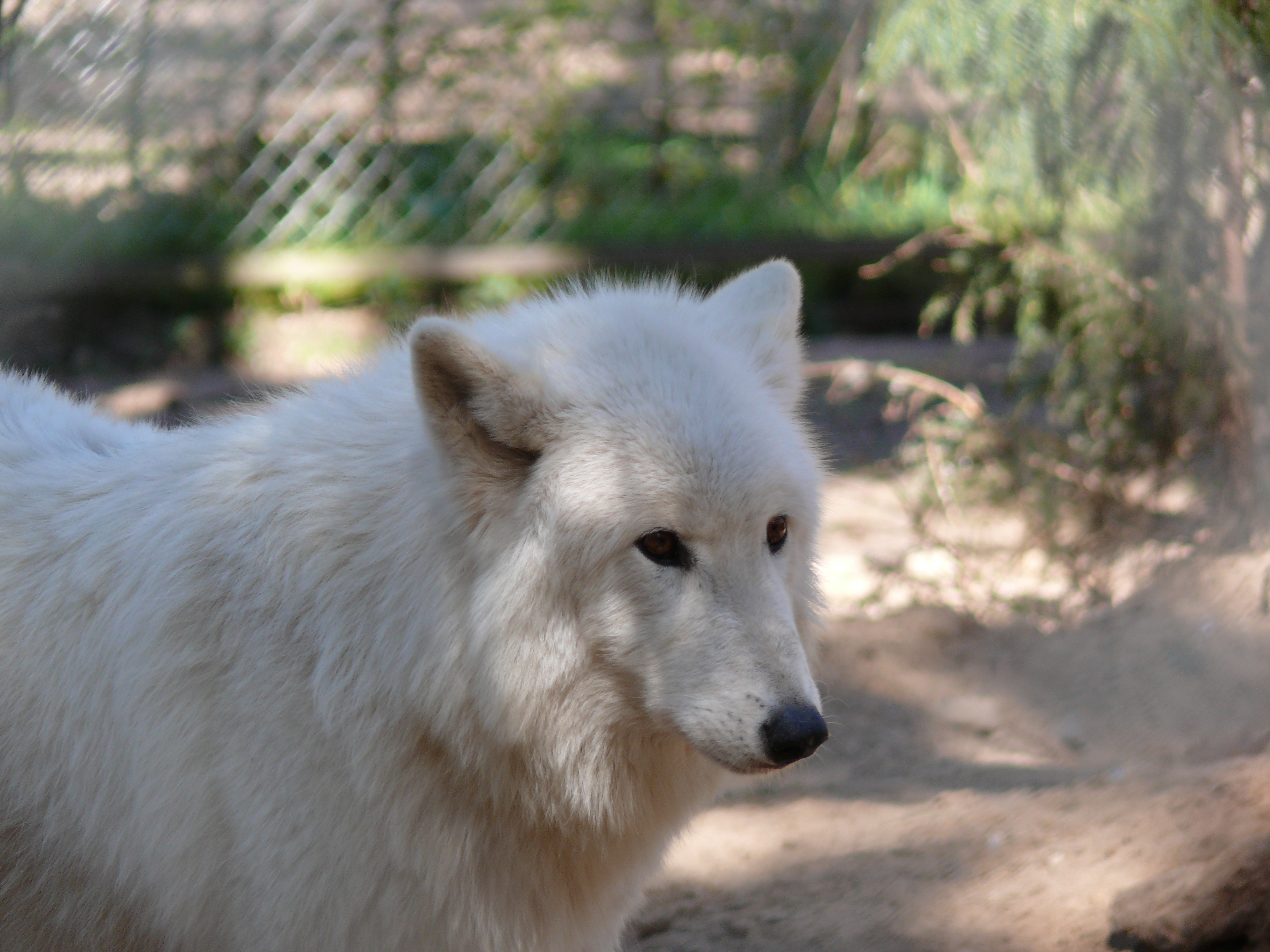 Polarwolf (Canis lupus arctos)